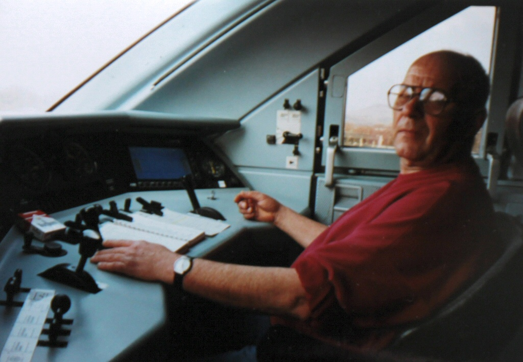 Ein Lokführer am Fahrpult eines ICE1